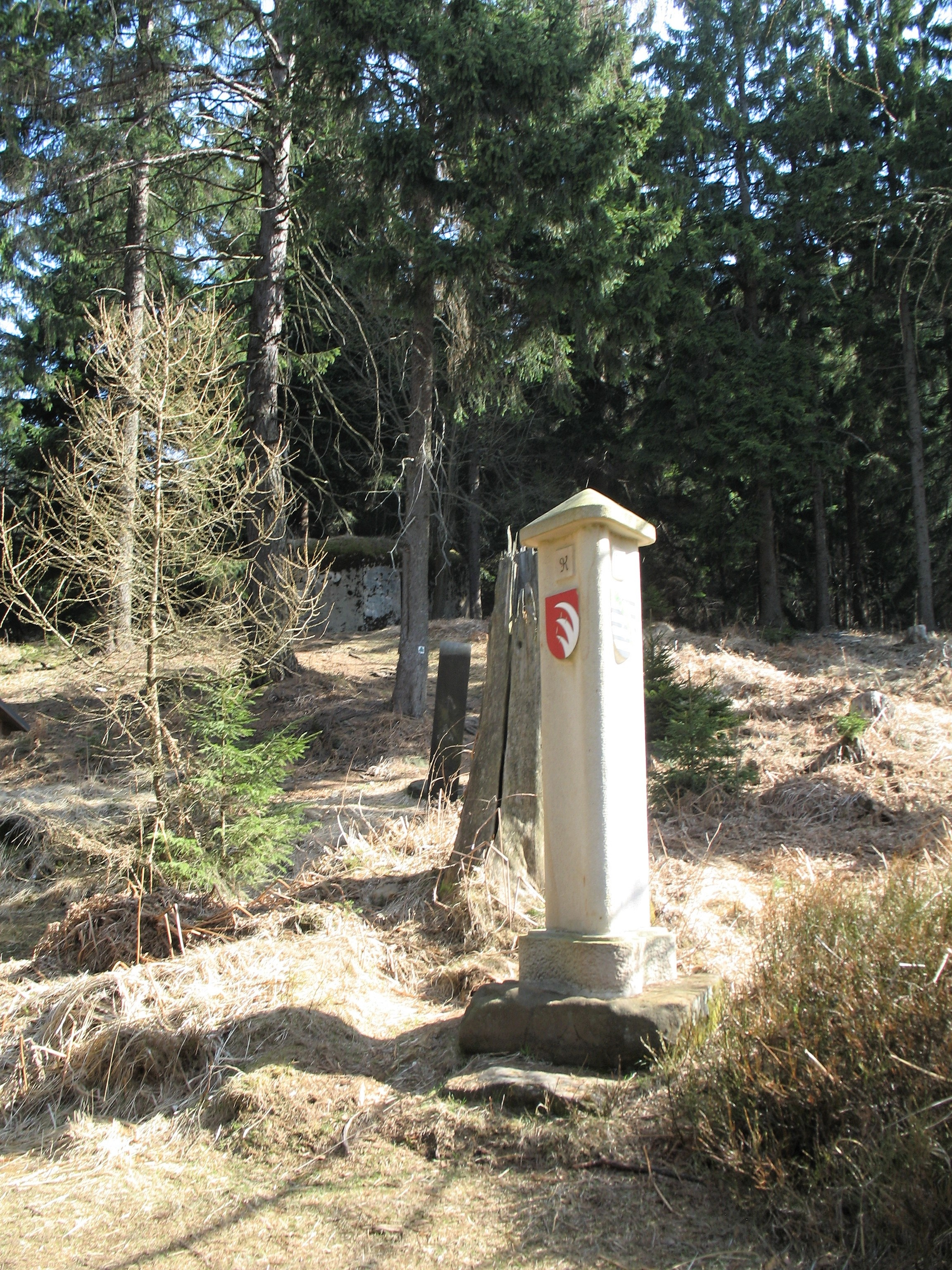 Historický Třípanský sloup, chráněný jako kulturní památka, se nacházel u Staré pražské cesty v lese mezi Jelením kamenem (Konopáčem) a železniční stanicí Jedlová v Lužických horách až do roku 1999, kdy byl ukraden. V roce 2016 byla na původní podstavec umístěna zmenšená kopie sloupu.